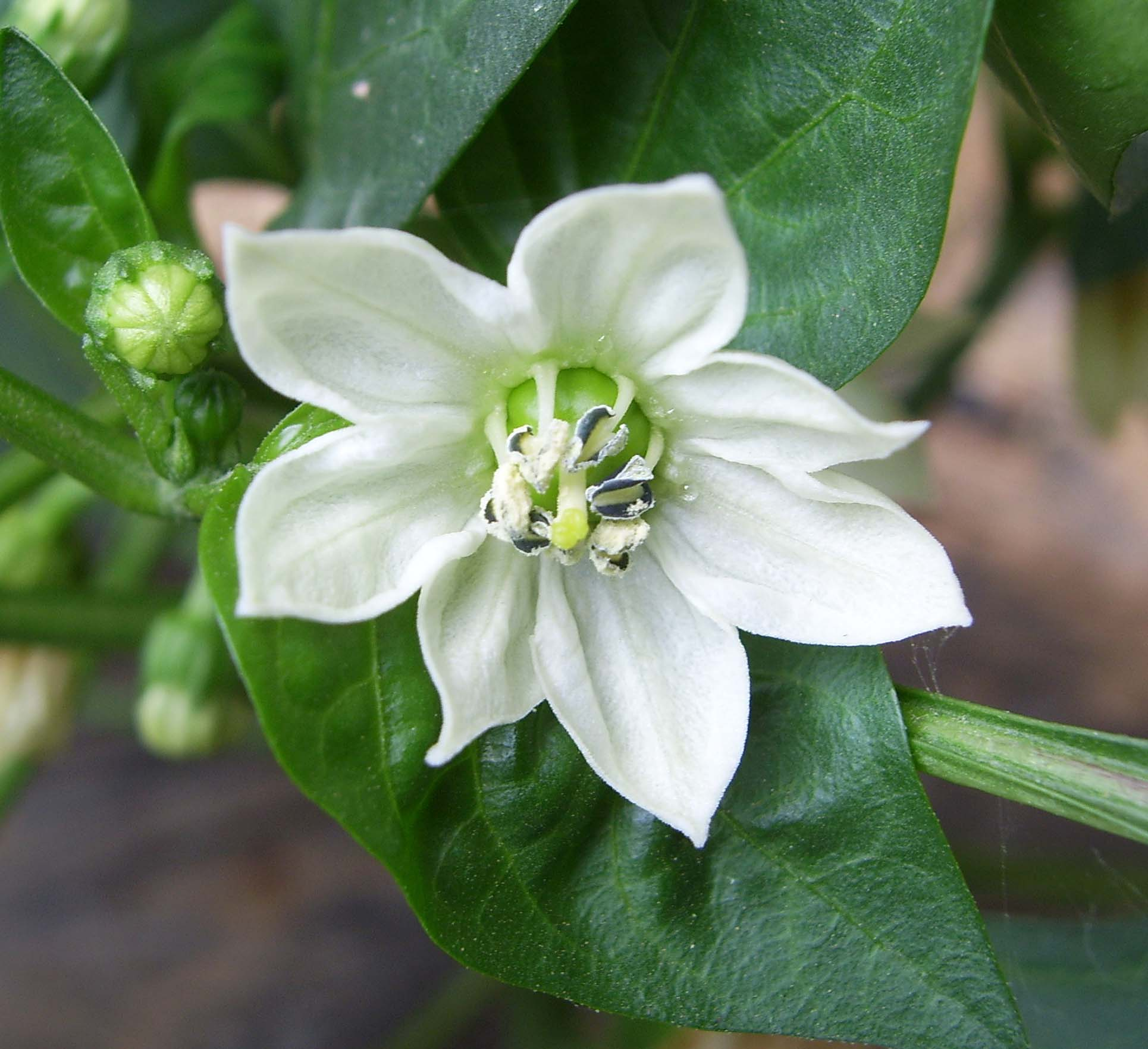 柿子椒的花